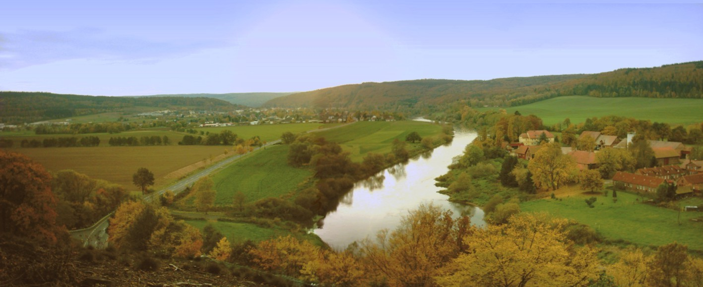 Oberweser bei Hann. Münden - selbst fotografiert 11/2005 - GNU-FDL